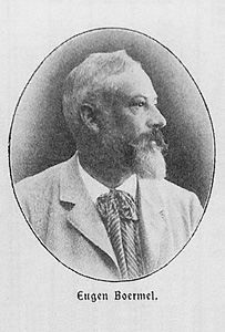 Portrait des Bildhauers Eugen Boermel (1858-1932), vor 1907